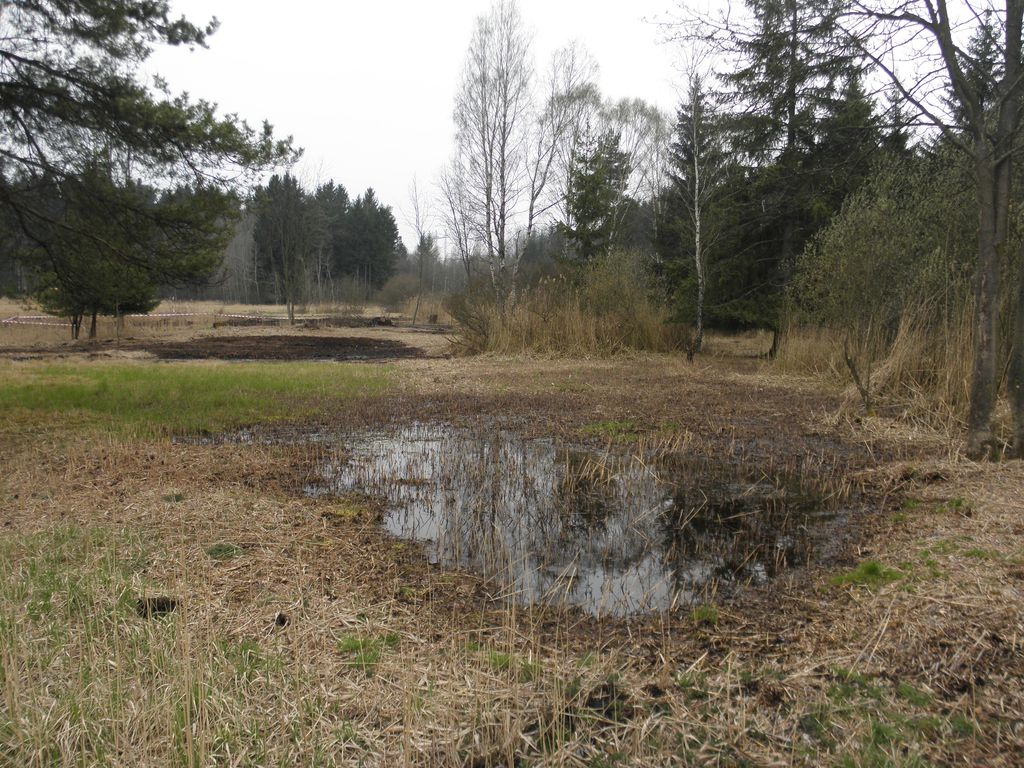 PR Chvojnov